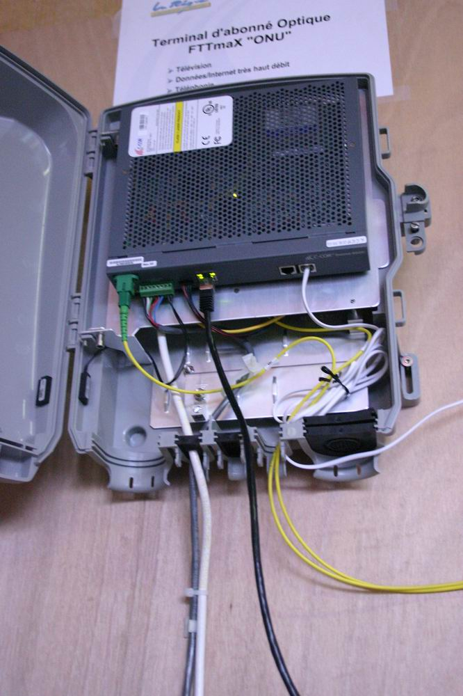 Auteur : Modesto Alexandre